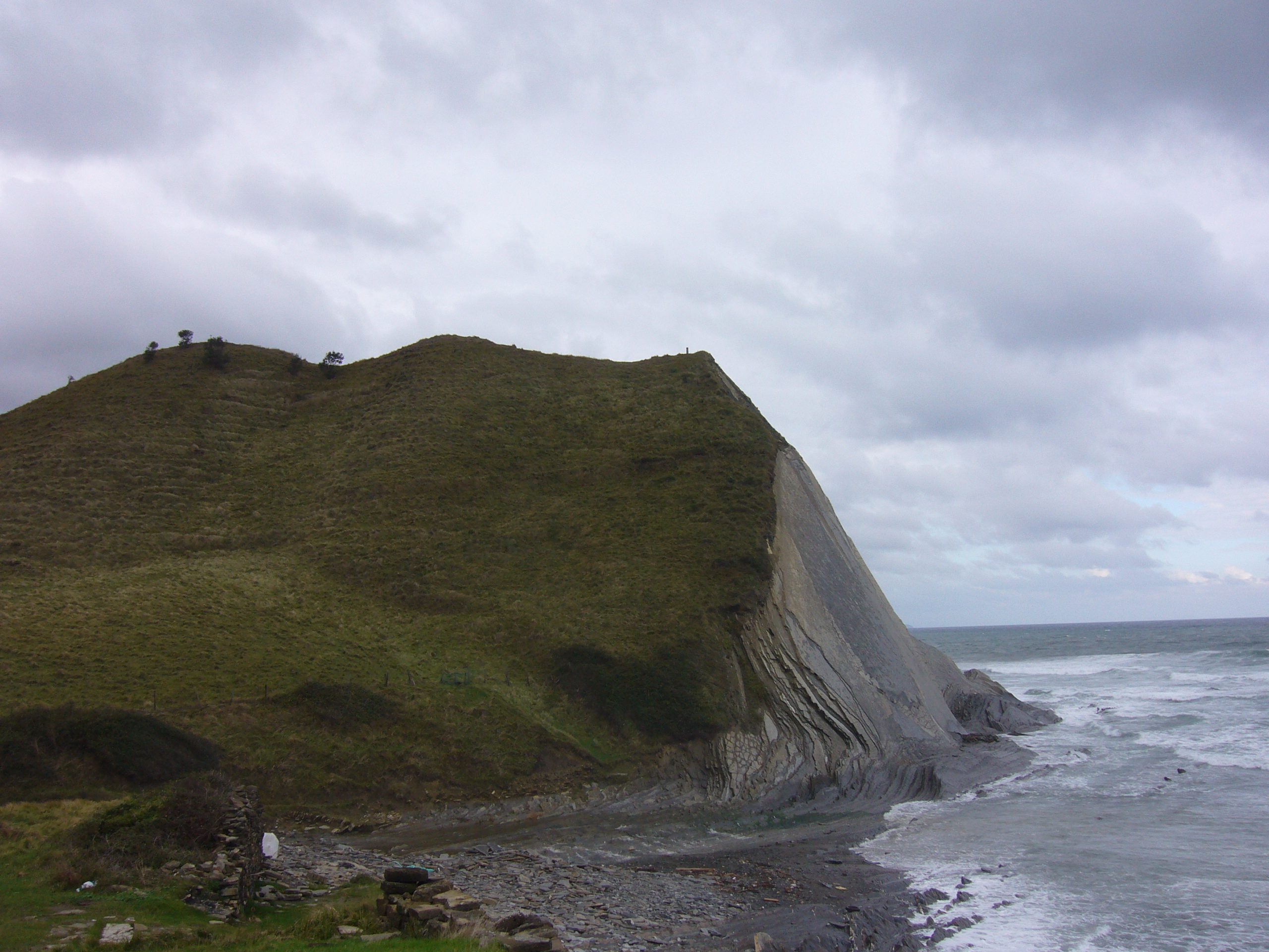 Itsaspeko hondartza